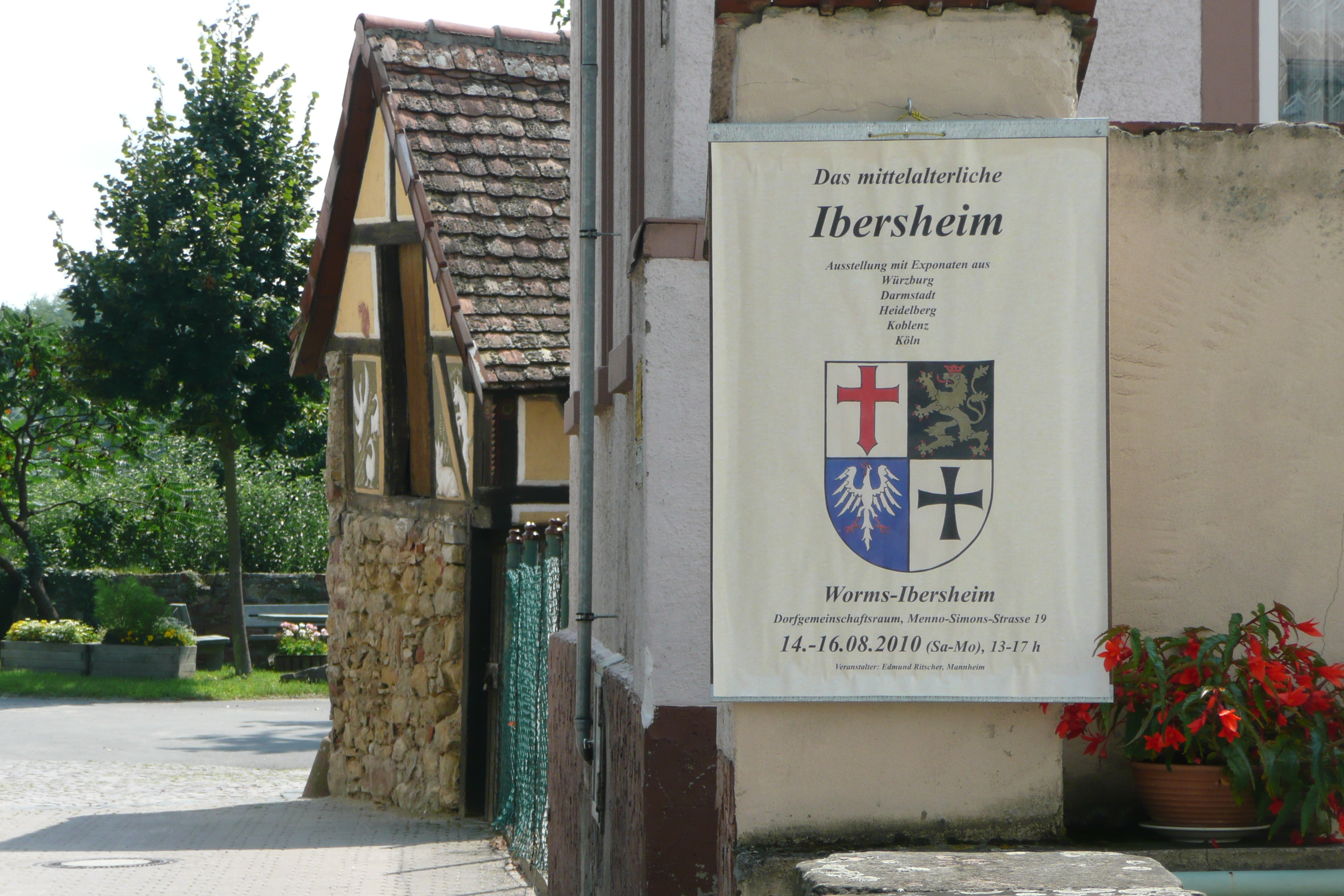 Ausstellung beim Museum